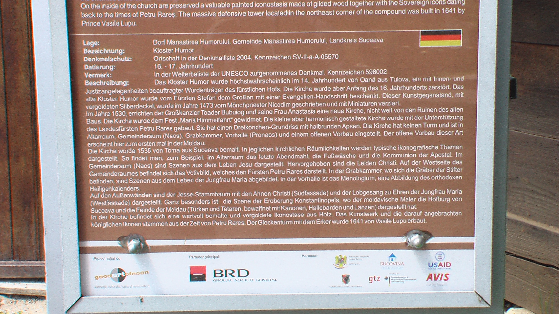 KlosterHumoruluiBeschreibung